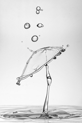 Tropfen auf Tropfen